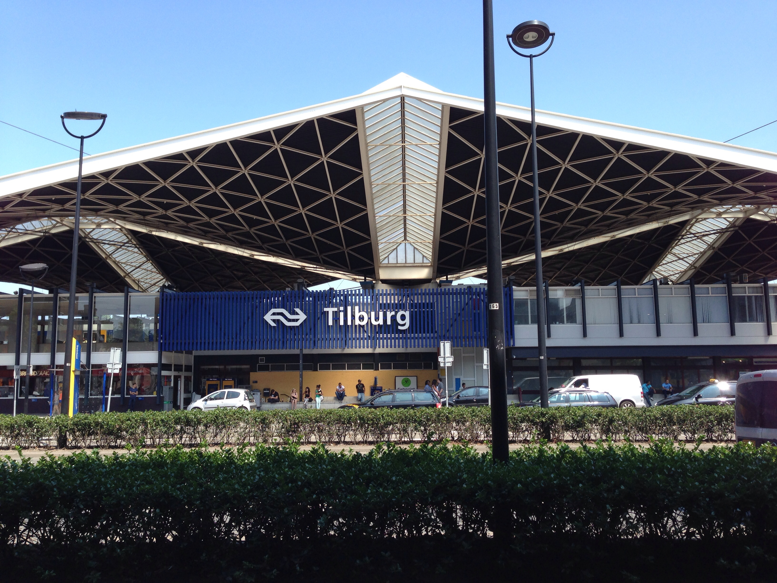 Zicht op deel van de voorzijde van Centraal Station Tilburg, gelegen aan de Spoorlaan, niet ver van het centrum van Tilburg, in 2013 Its number in the list of 89 proposed monuments is: 2013-80 For more information see Dutch Wikipedia: 89 topmonumenten uit de periode 1959-1965